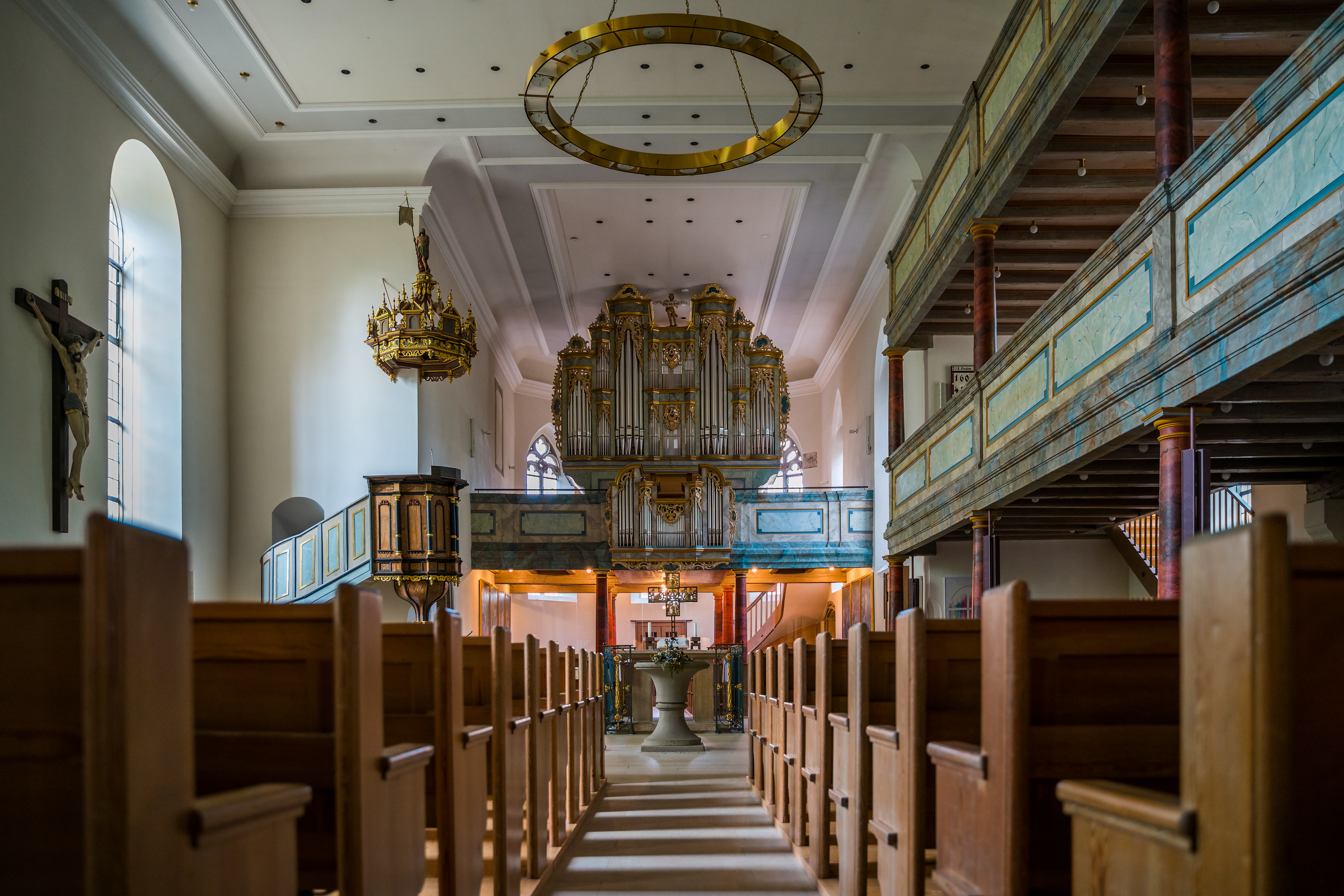 Innenansicht der Lutherkirche in Fellbach.